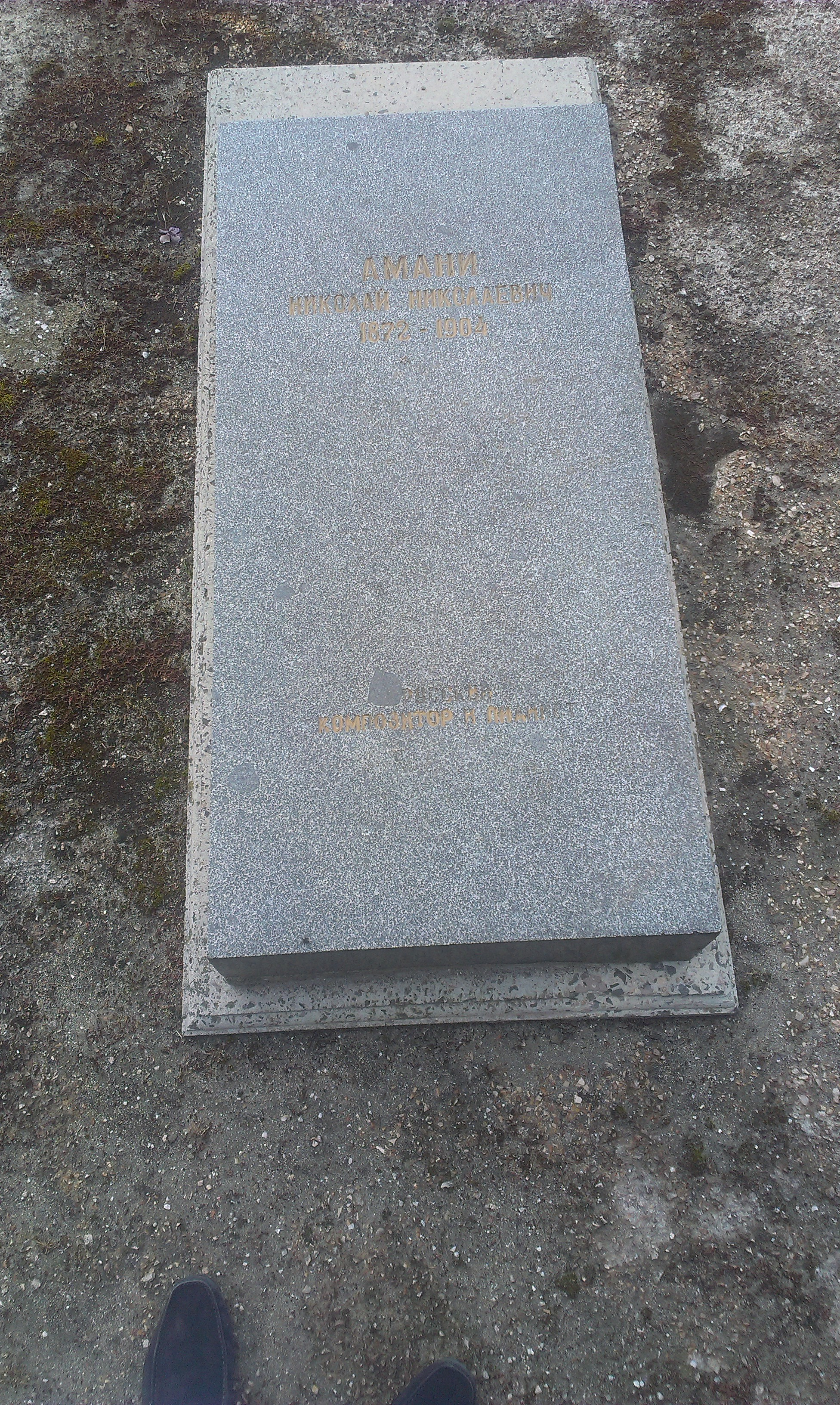 Поликуровский мемориал